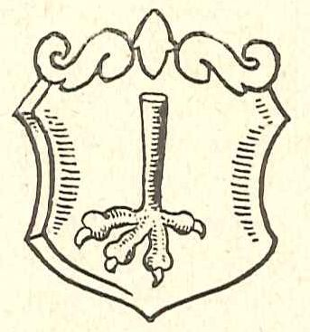 Ehemaliges Undenheimer Ortswappen von 1948